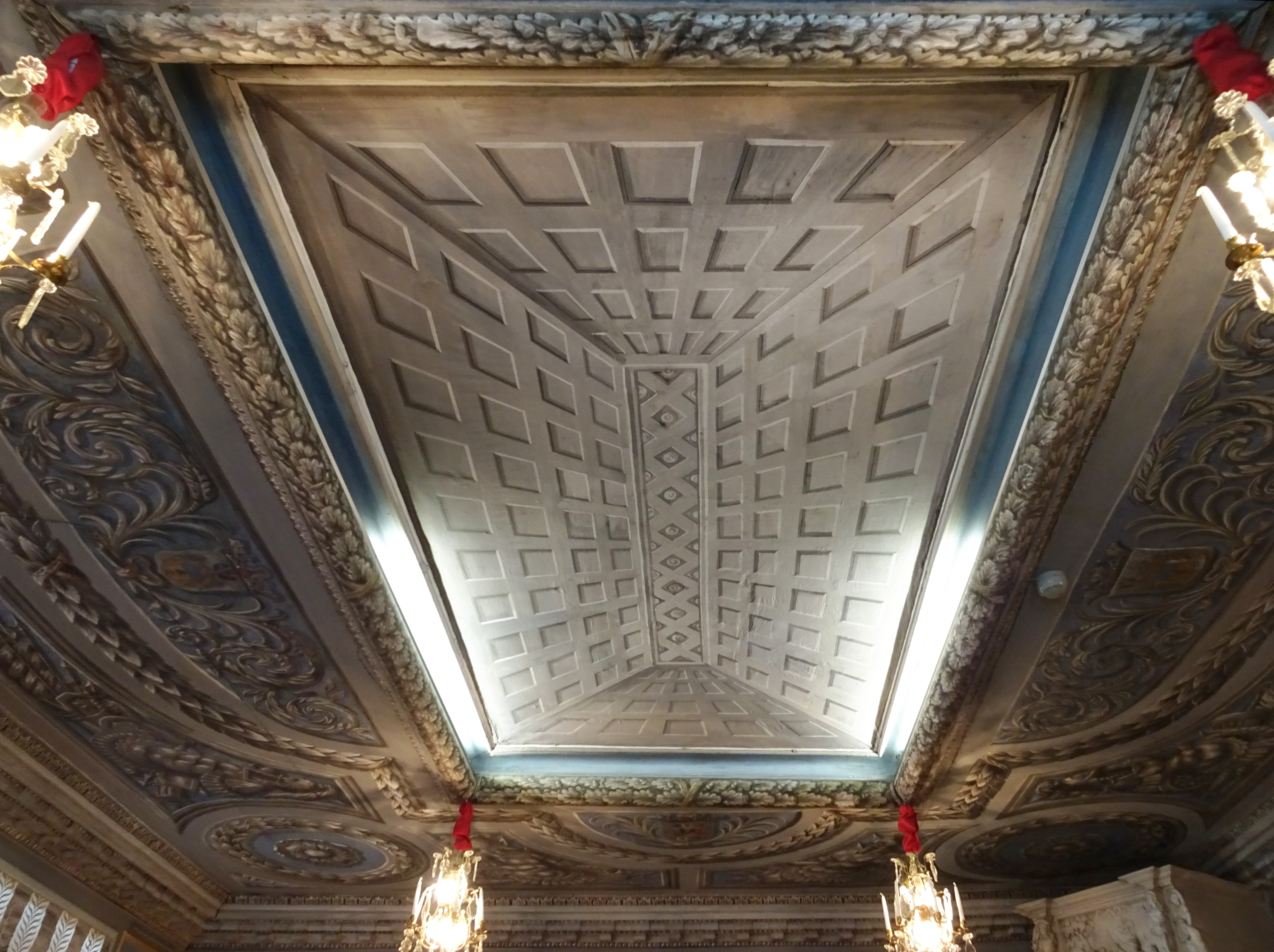 Ekebyhov, interiör, taket i Wrangelska salen